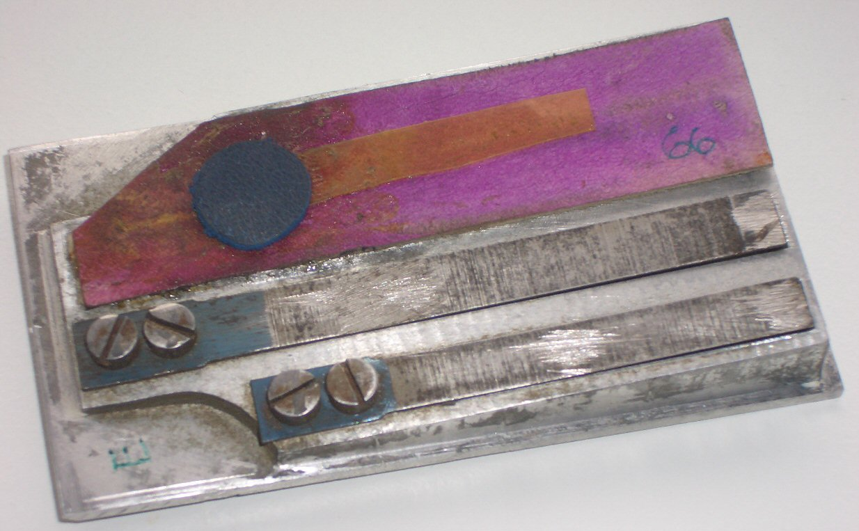 Alte Helikonstimmplatte von unten gesehen Möglichkeiten zur Lizenzierung, bitte die nicht-benötigte Variante aus dem Code löschen